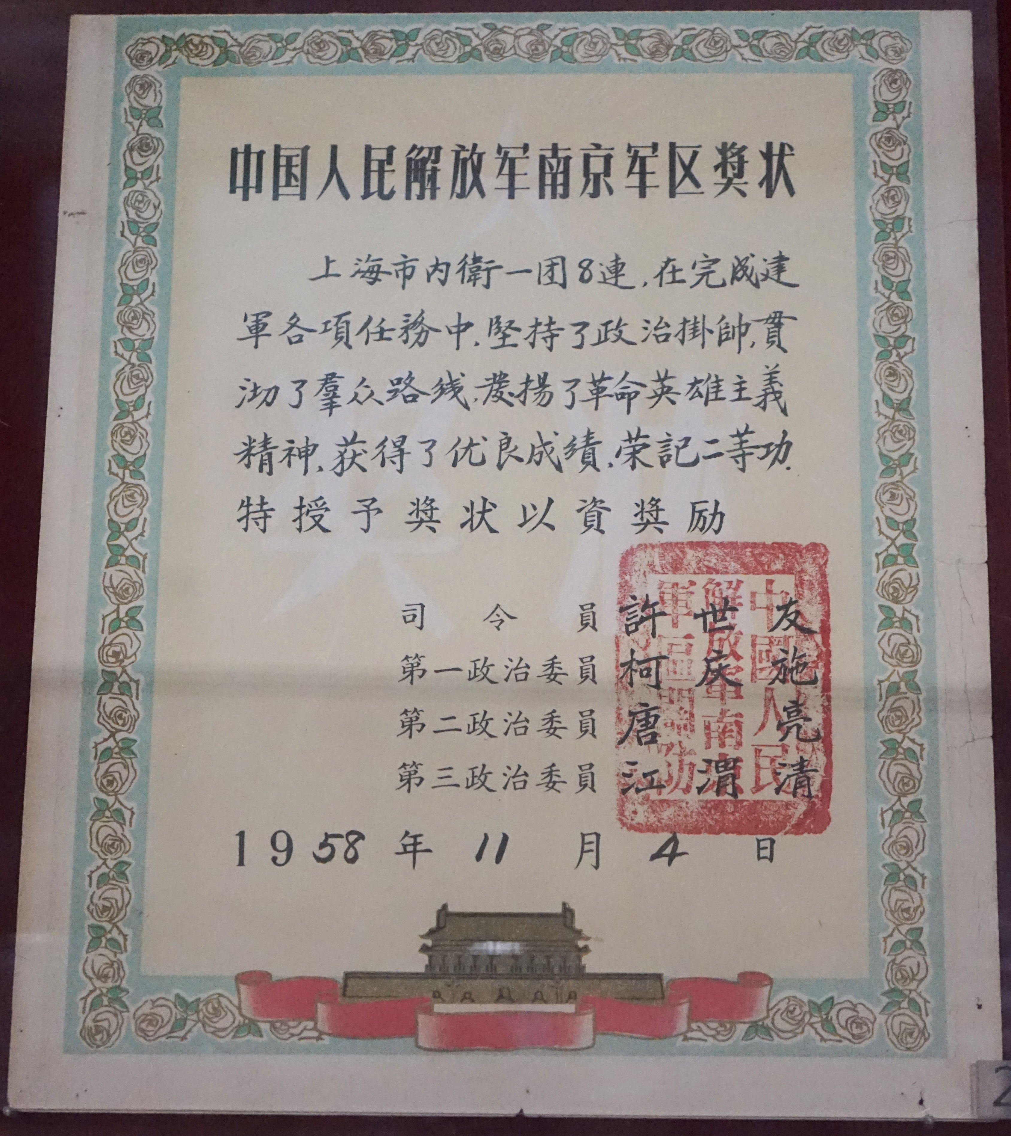 南京军区颁发给“南京路上好八连”的二等功奖状。一级文物